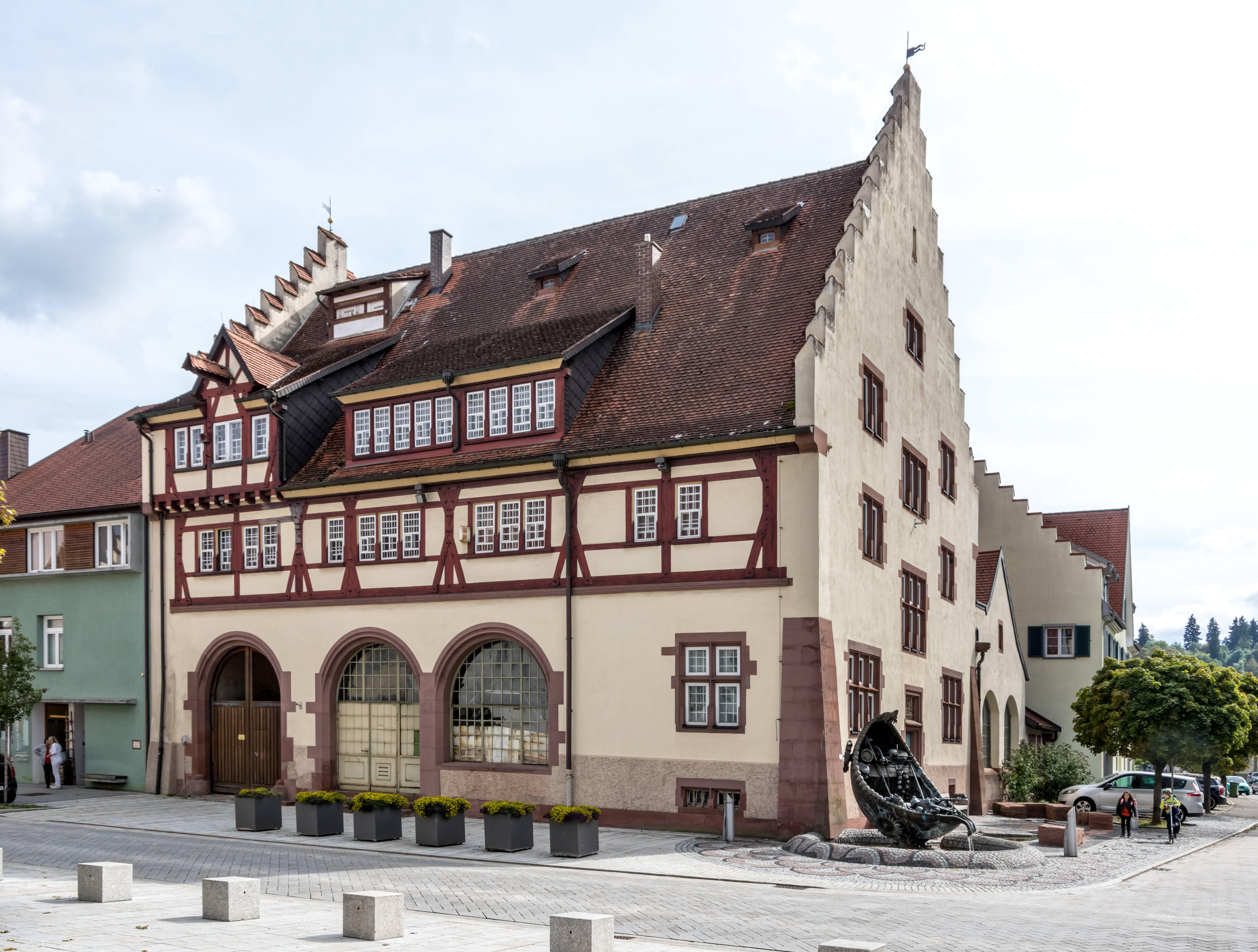 Bilder aus Bräunlingen